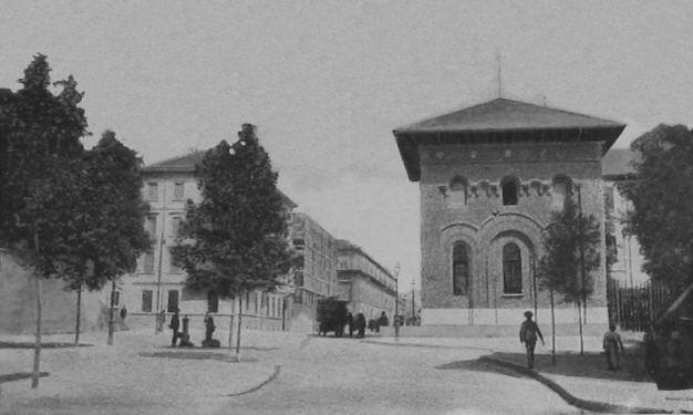 Una rara immagine del casello daziario di Porta Lodovica.